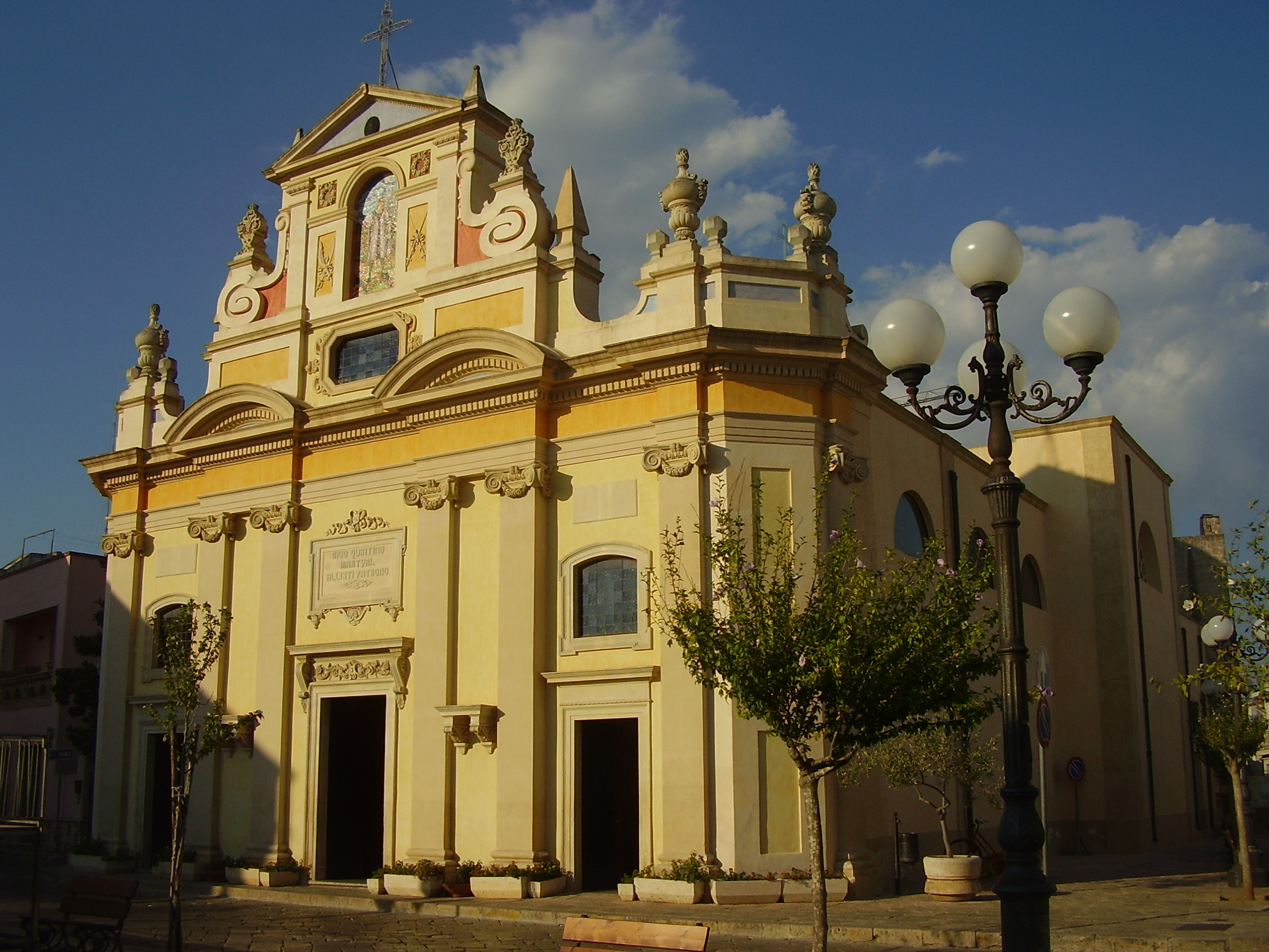 Chiesa San Quintino Alliste